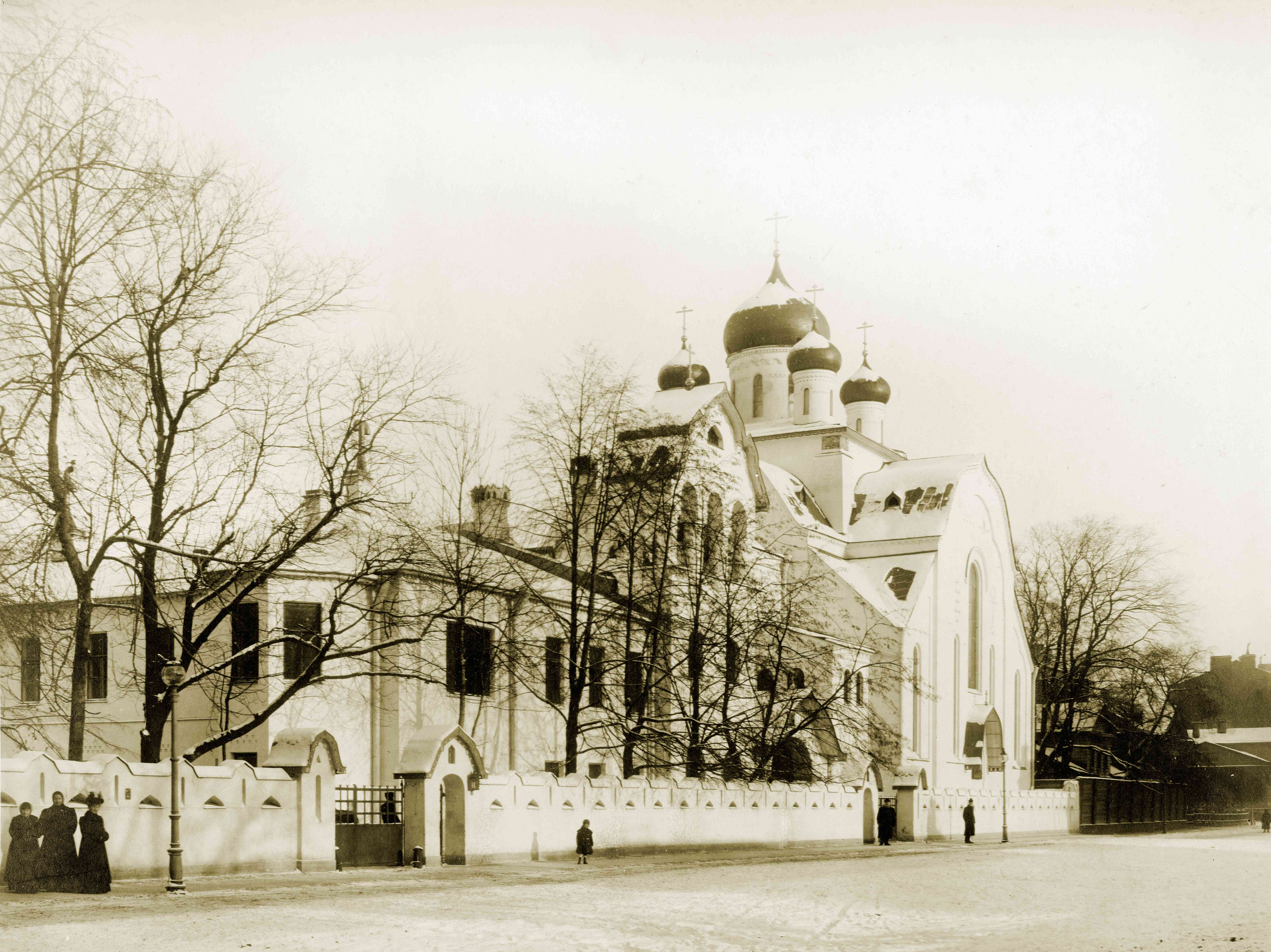 Вид с Таврической улицы. 1909г.